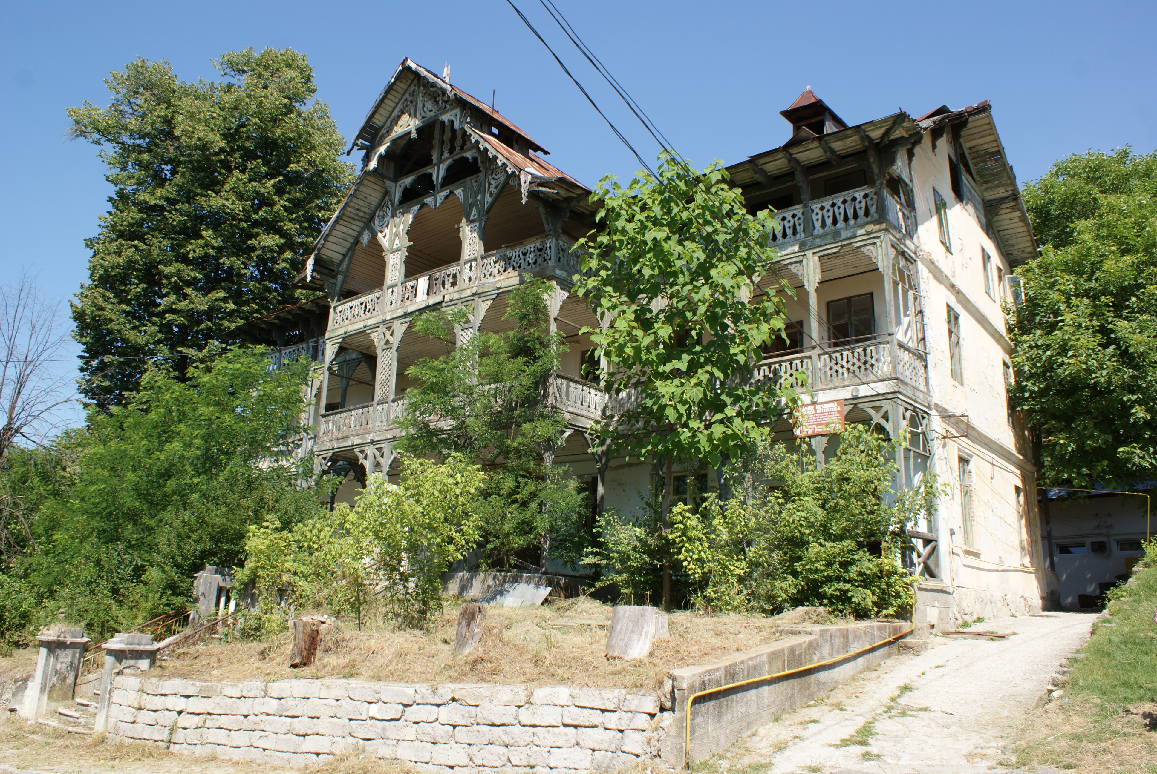 Vila colonelului Mihail Ivanovici (construită aprox 1895) a functionat ca hotel iar după nationalizare ca internat pentru elevi, școală, grădiniță și imobil de locuințe.